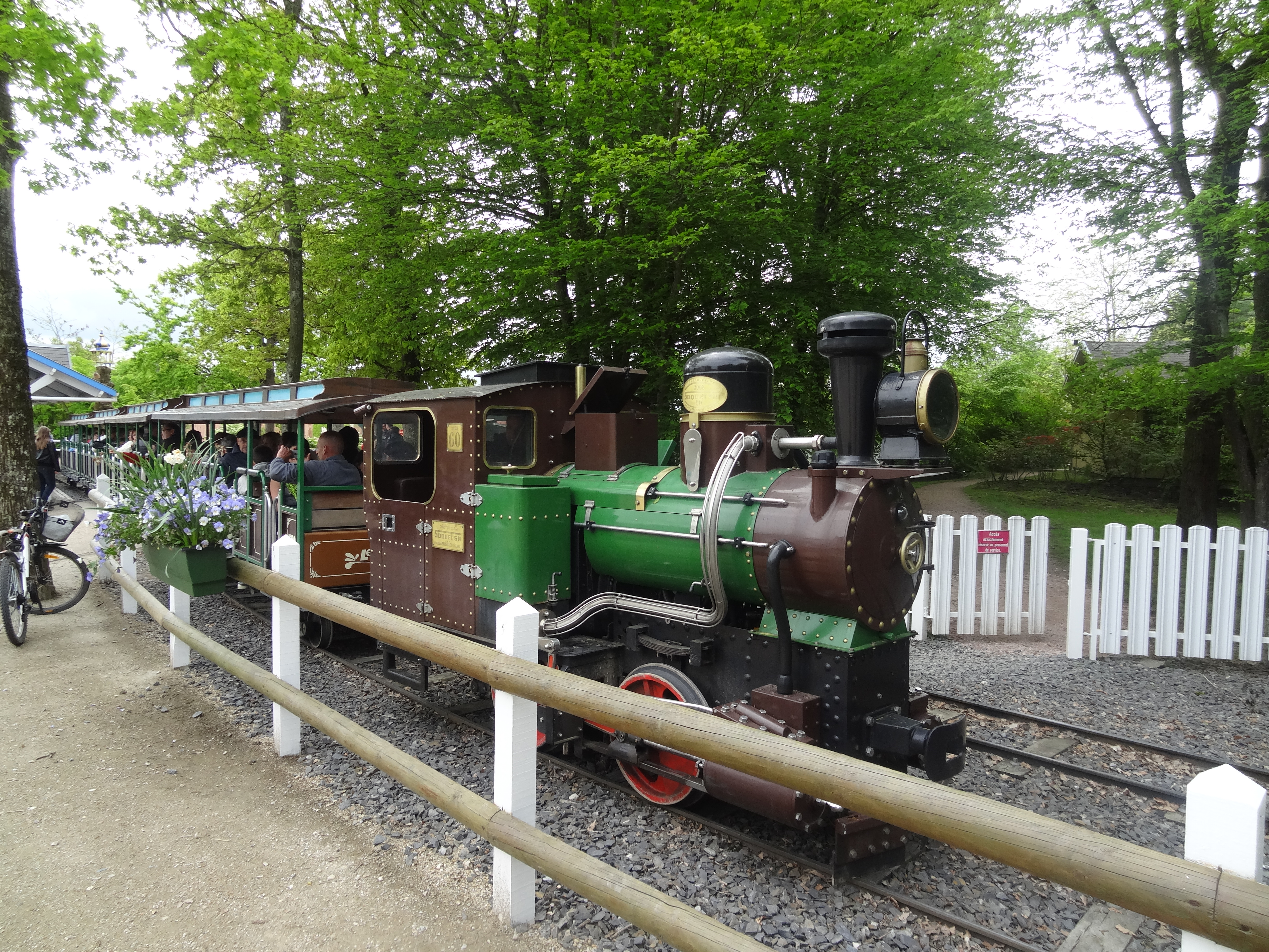 Train du parc français Le PAL.